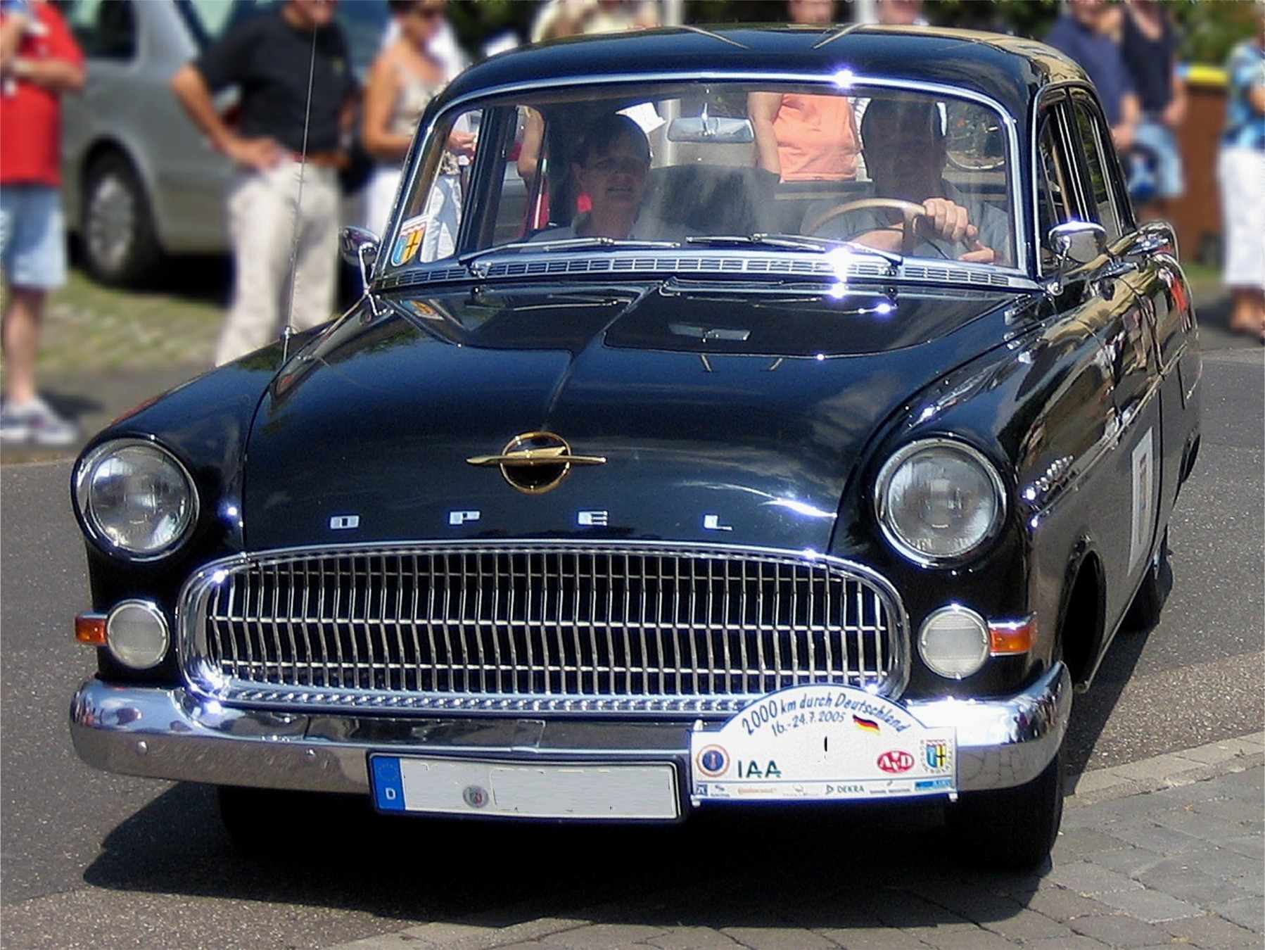 Opel Kapitän, 1956 - Oldtimerrallye "2000 km durch Deutschland".